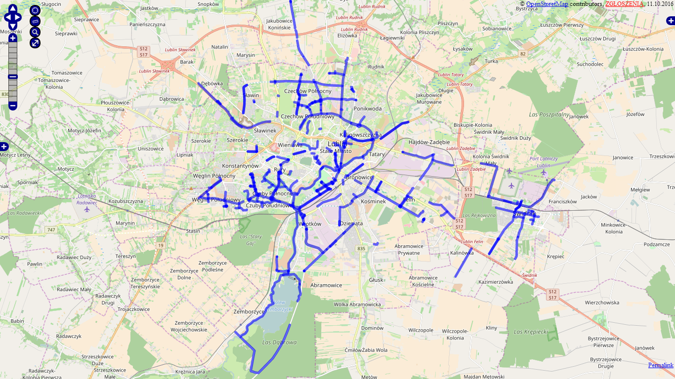 Mapa infrastruktury rowerowej w Lublinie